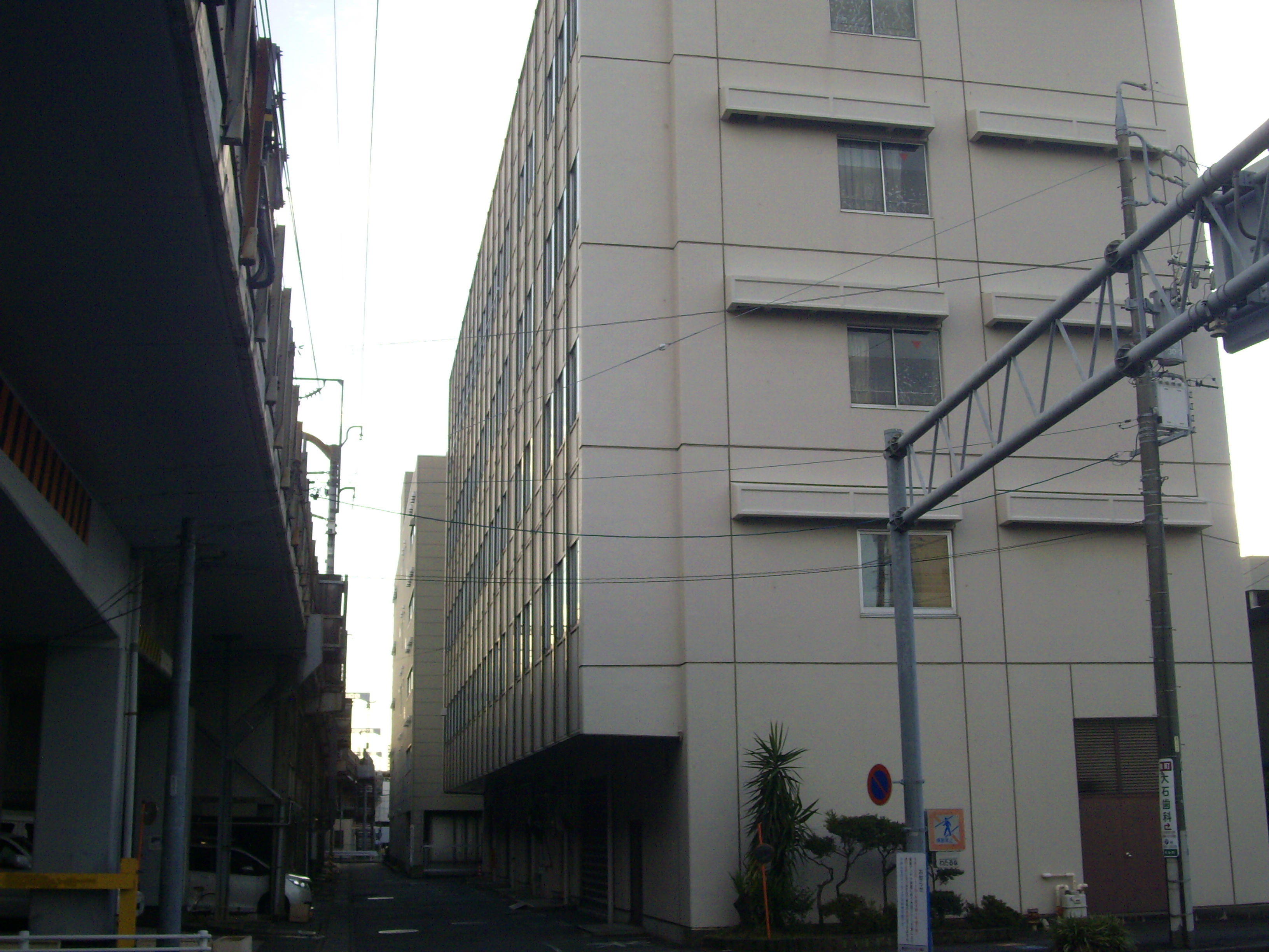 東海旅客鉄道新幹線鉄道事業本部静岡分駐所ビルの外観。静岡保線所・新幹線構造物検査センター・静岡電力所も入居する。 Caution:Sorry！Built-in clock error!!